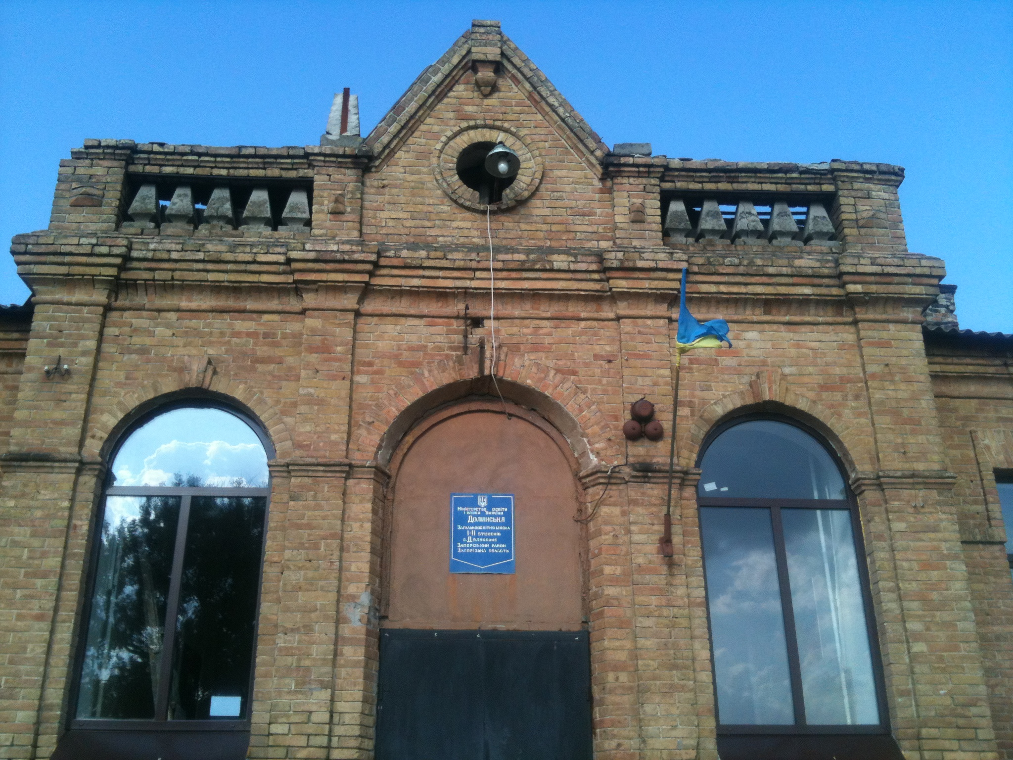 Село Долинське (Запорізький район), 2013 рік. Долинська школа І-ІІ ступенів Запорізького району Запорізької області